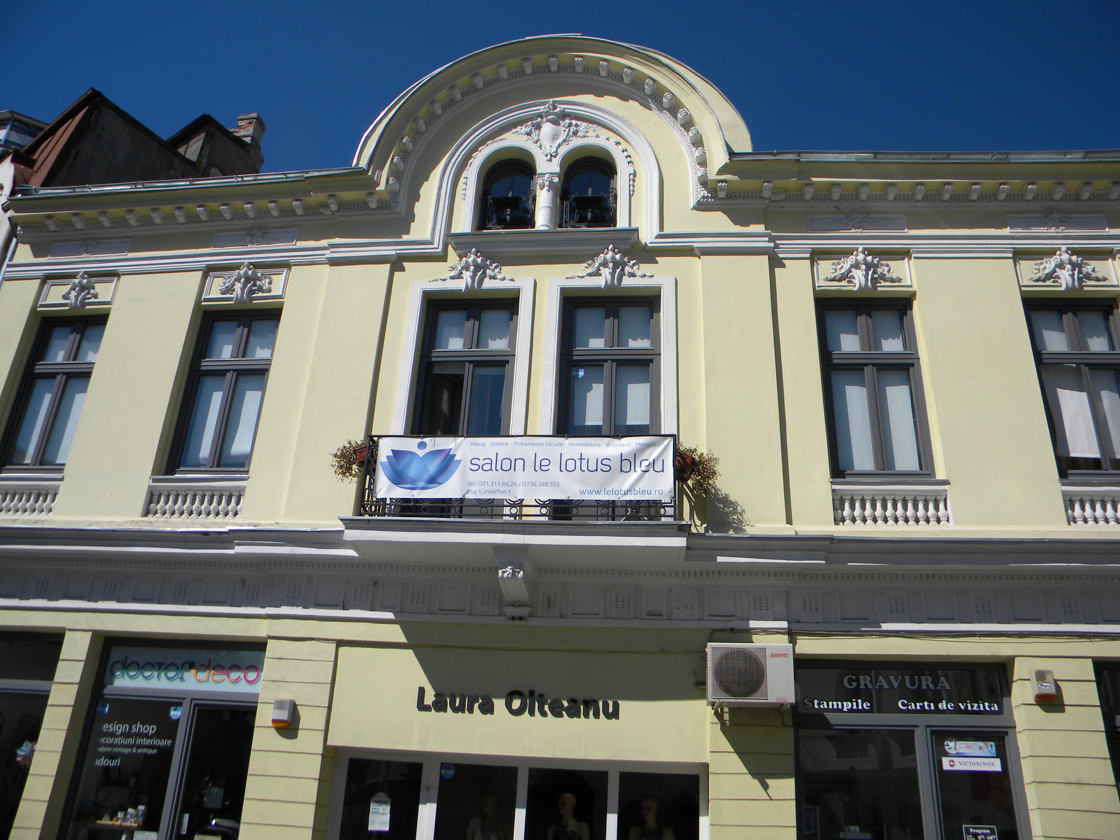 Bucuresti, Romania, Casa pe Str. Coltei nr. 3, sect. 3